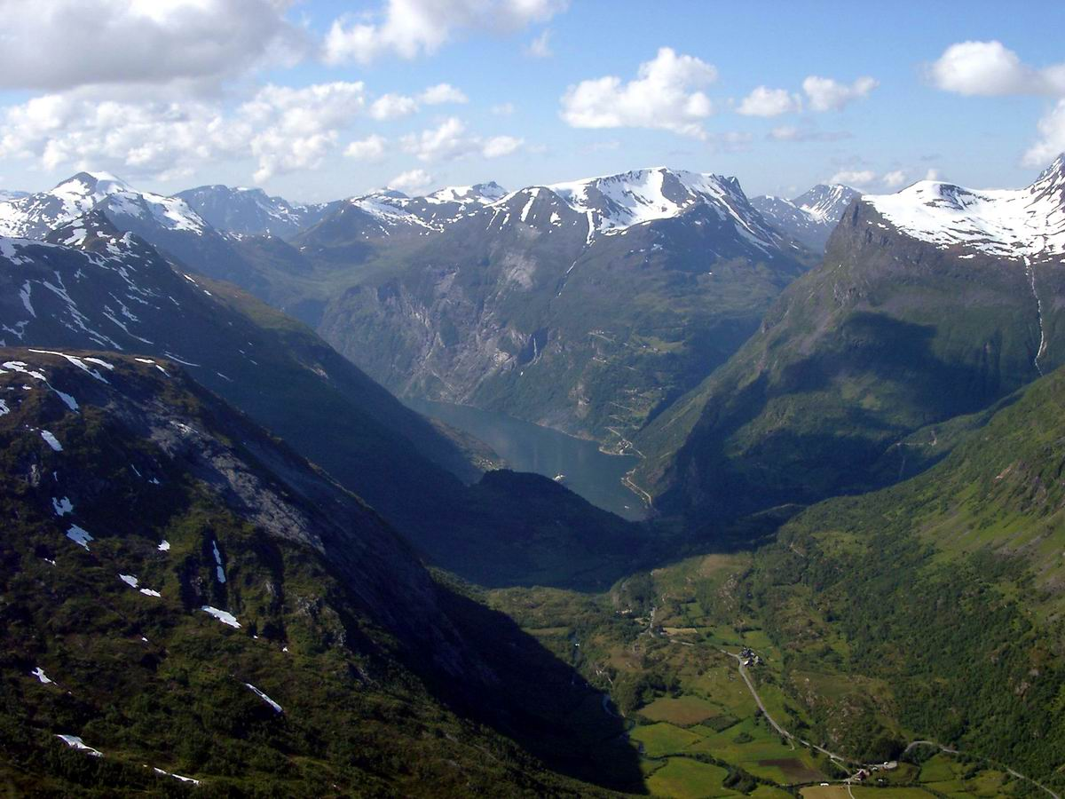 Dalsnibba; Blick auf Geiranger 1 Norwegen